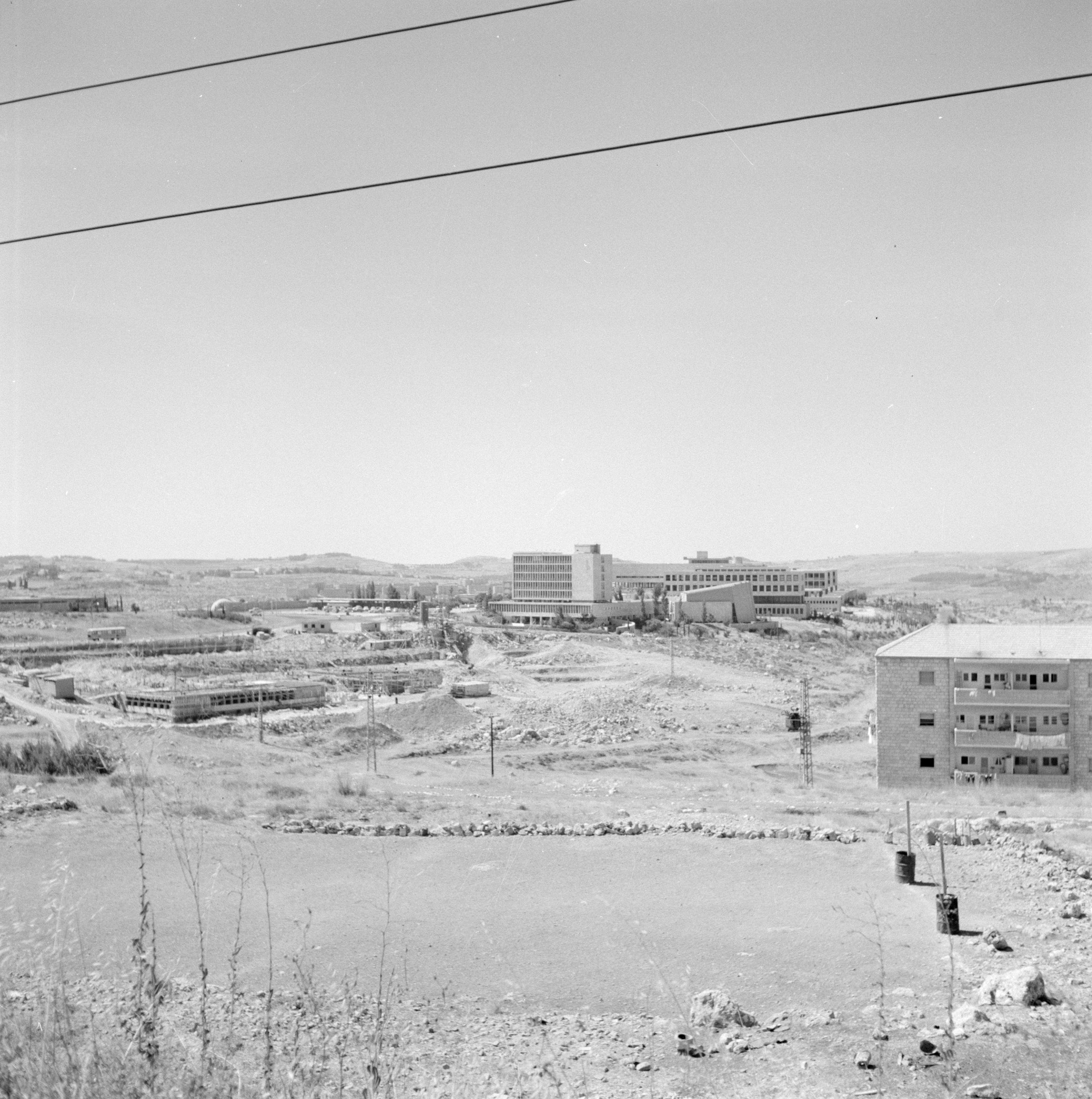 Collectie / Archief : Fotocollectie Van de Poll Reportage / Serie : Israël 1964-1965: Jerusalem (Jeruzalem), Hebrew University Beschrijving : Campus van de "Hebrew University" in Jeruzalem Annotatie : Op 1 april 1925, werd de Hebreeuwse Universiteit van Jeruzalem geopend tijdens een feestelijke ceremonie die werd bijgewoond door de leiders van de wereld. Het eerste bestuur van de Universiteit bestond onder andere uit grootheden als Albert Einstein, Sigmund Freud, Martin Buber, James Rothschild en Sir Alfred Mond Datum : 1964 Locatie : Israël, Jeruzalem Trefwoorden : campus, panorama's, universiteiten Fotograaf : Poll, Willem van de, [onbekend] Auteursrechthebbende : Nationaal Archief Materiaalsoort : Negatief (zwart/wit) Nummer archiefinventaris : bekijk toegang 2.24.14.02 Bestanddeelnummer : 255-2409